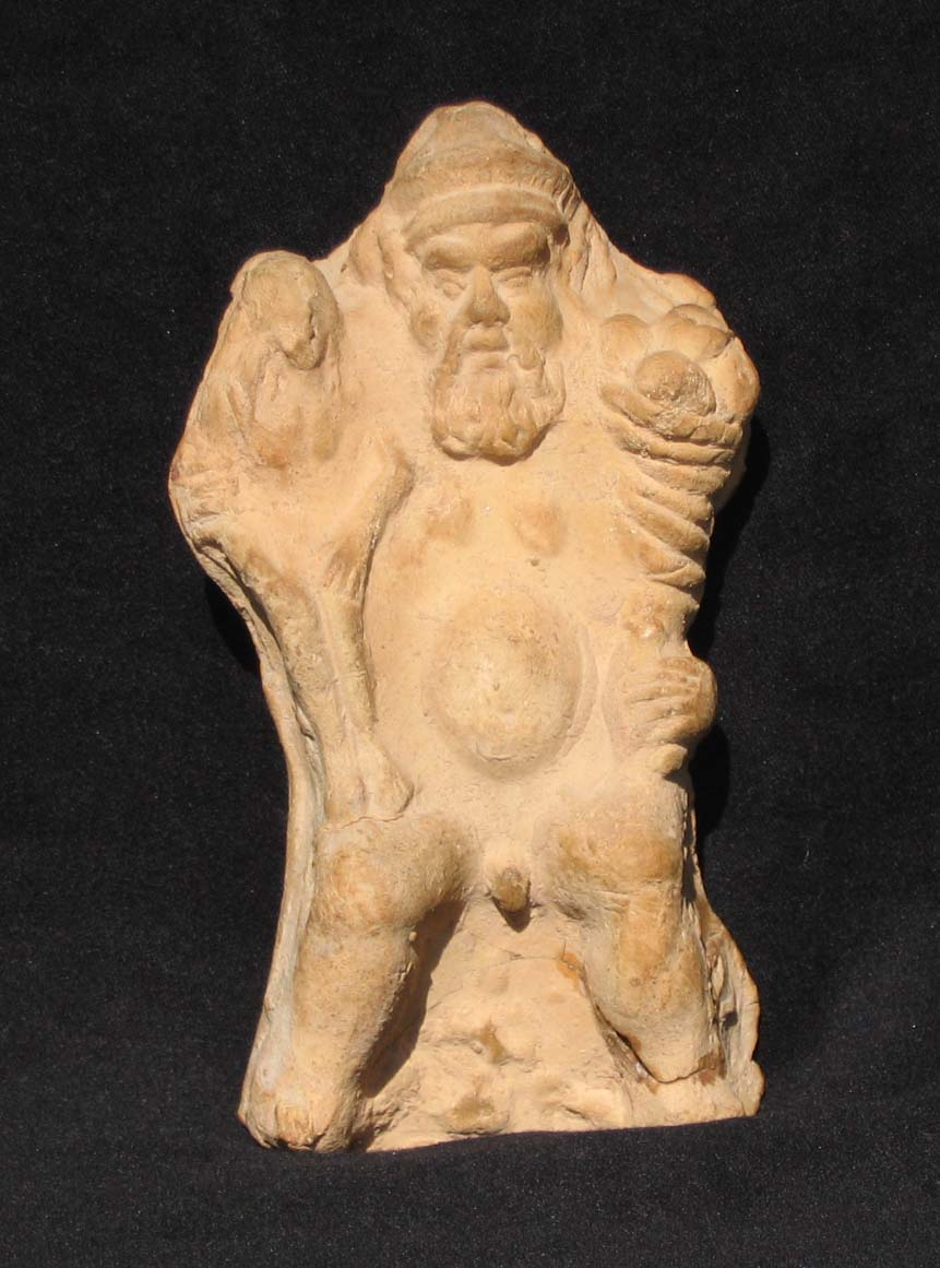 Figurina votiva liparea VI sec a.C., Lipari. Autore della fotografia è Giorces.